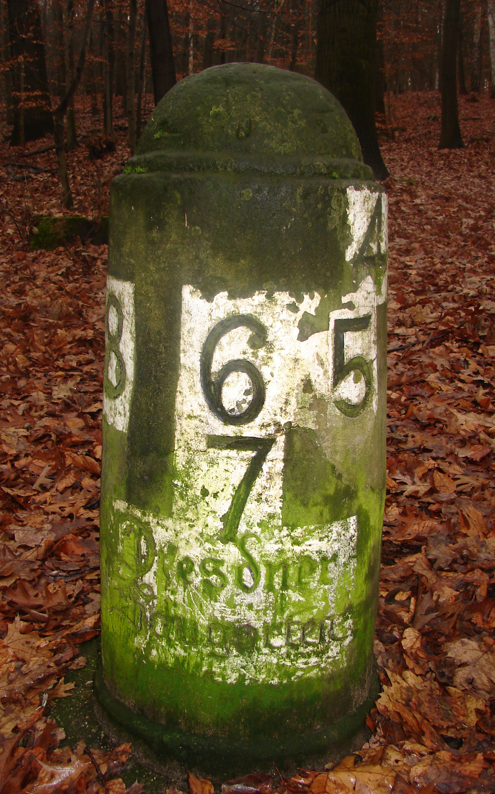 Säule im Dresdner Saugarten mit den Zahlen 1 bis 8, exakt im Zentrum des alten Wegesystems der Dresdner Heide, wo sich die acht Flügelwege treffen